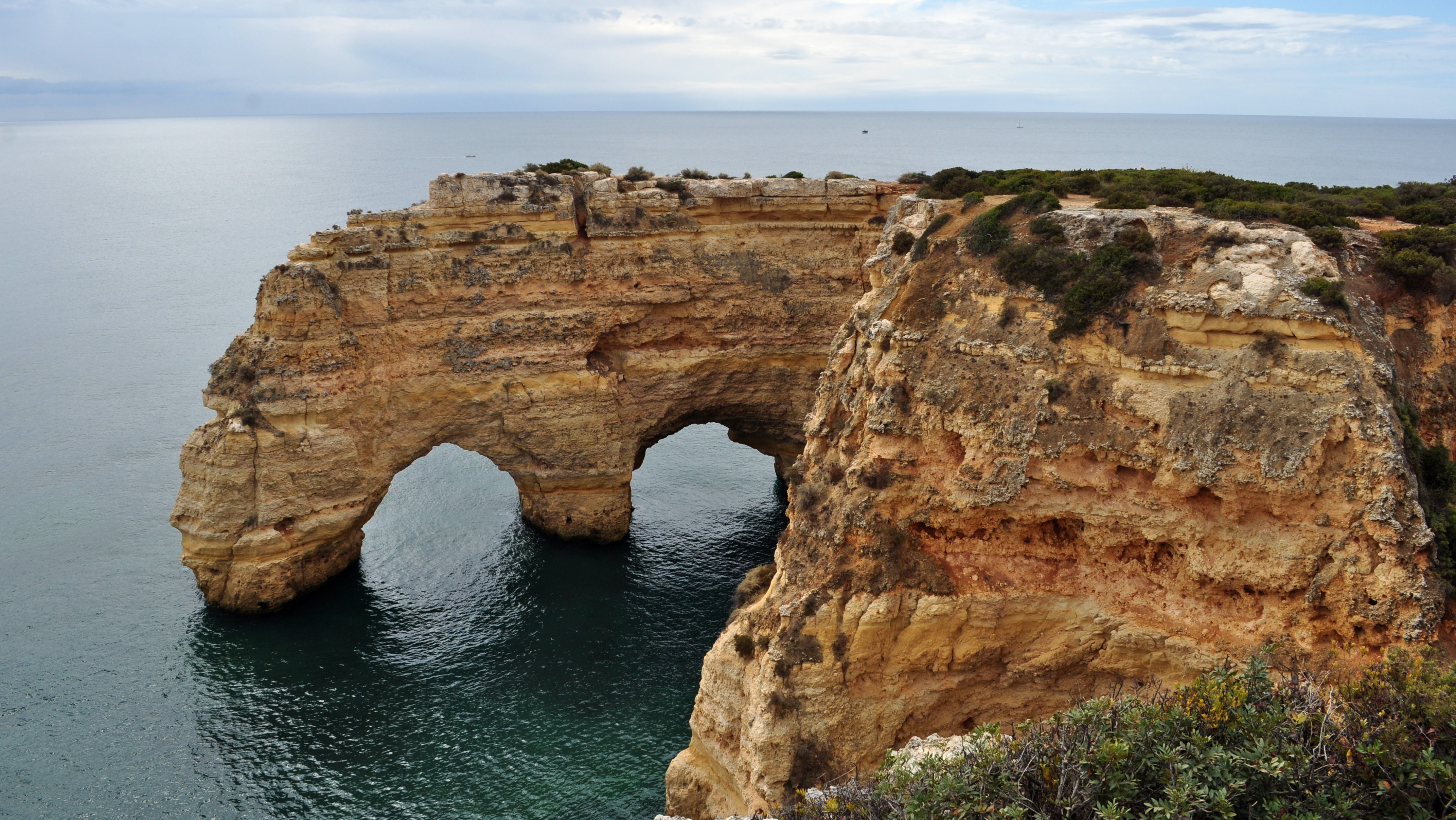 Praia da Marinha (2012-09-27), by Klugschnacker in Wikipedia (31)